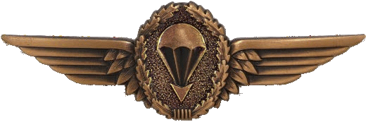 Sonderabzeichen für Fallschirmspringer der Bundeswehr Voraussetzungen: Stufe I, Bronze: Besitz eines Militärfallschirmspringerscheins und fünf Fallschirmsprünge aus Luftfahrzeugen mit Zulassung zum Absetzen von Fallschirmspringern. Stufe II, Silber: Wie Stufe I, jedoch 20 Fallschirmsprünge aus Luftfahrzeugen mit Zulassung zum Absetzen von Fallschirmspringern. Stufe III, Gold: Wie Stufe I, jedoch 50 Fallschirmsprünge aus Luftfahrzeugen mit Zulassung zum Absetzen von Fallschirmspringern. Anmerkung: Als Flugstunden angerechnet wird die gesamte Flugzeit als Luftfahrzeugbesatzungsangehörige einschließlich der Ausbildung. Ausführung: Stilisierter Fallschirm mit Eichenlaubumrandung in Doppelschwinge mit unterem Federkranz, metallgeprägt; bronze-, silber- oder goldfarben.